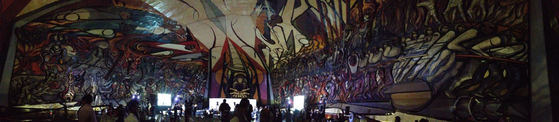 Panorámica interna del Polyforum Cultural Siqueiros.